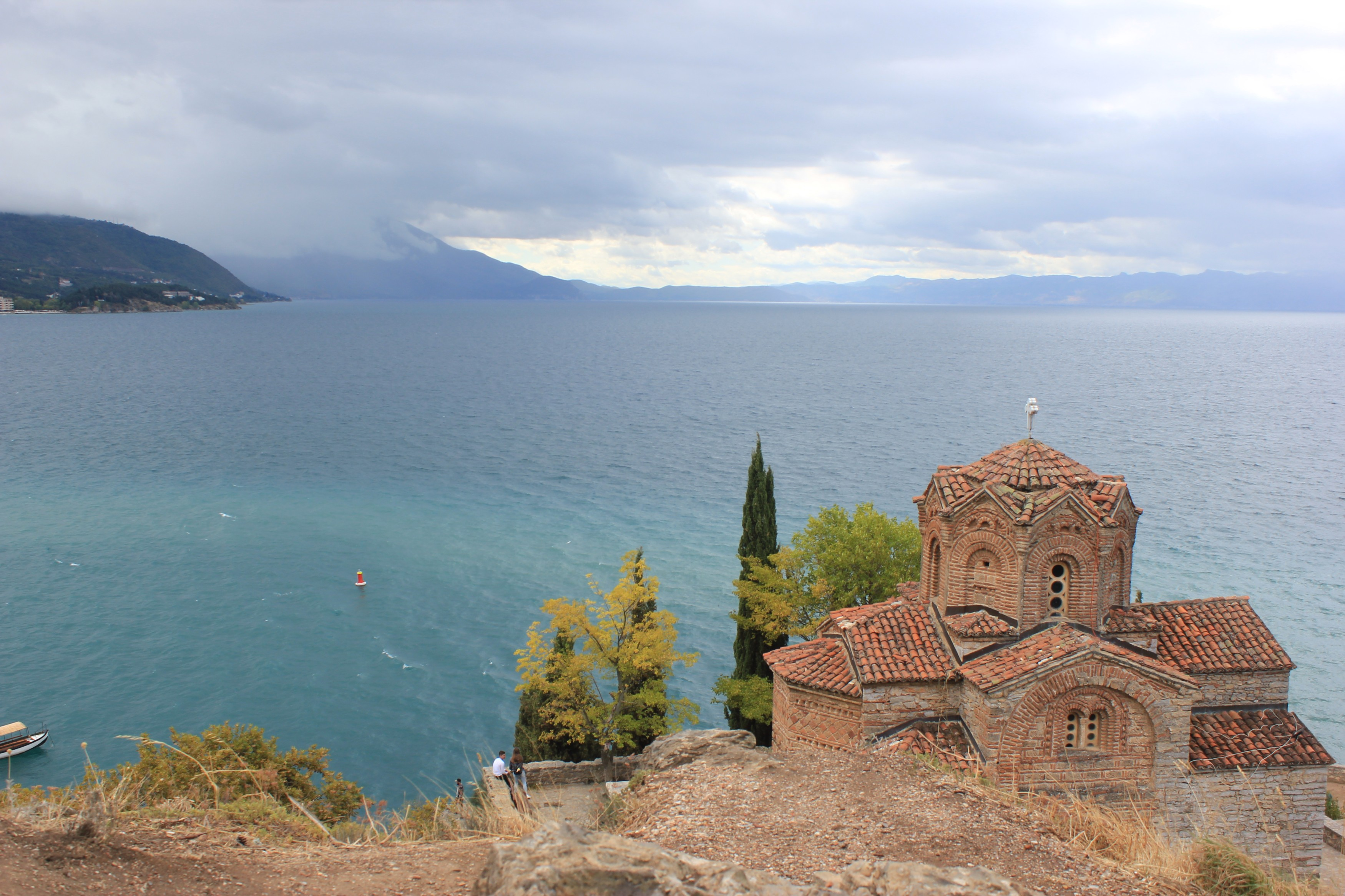 Kirche des Hlg. Johannes von Kaneo am Ohridsee in Ohrid.